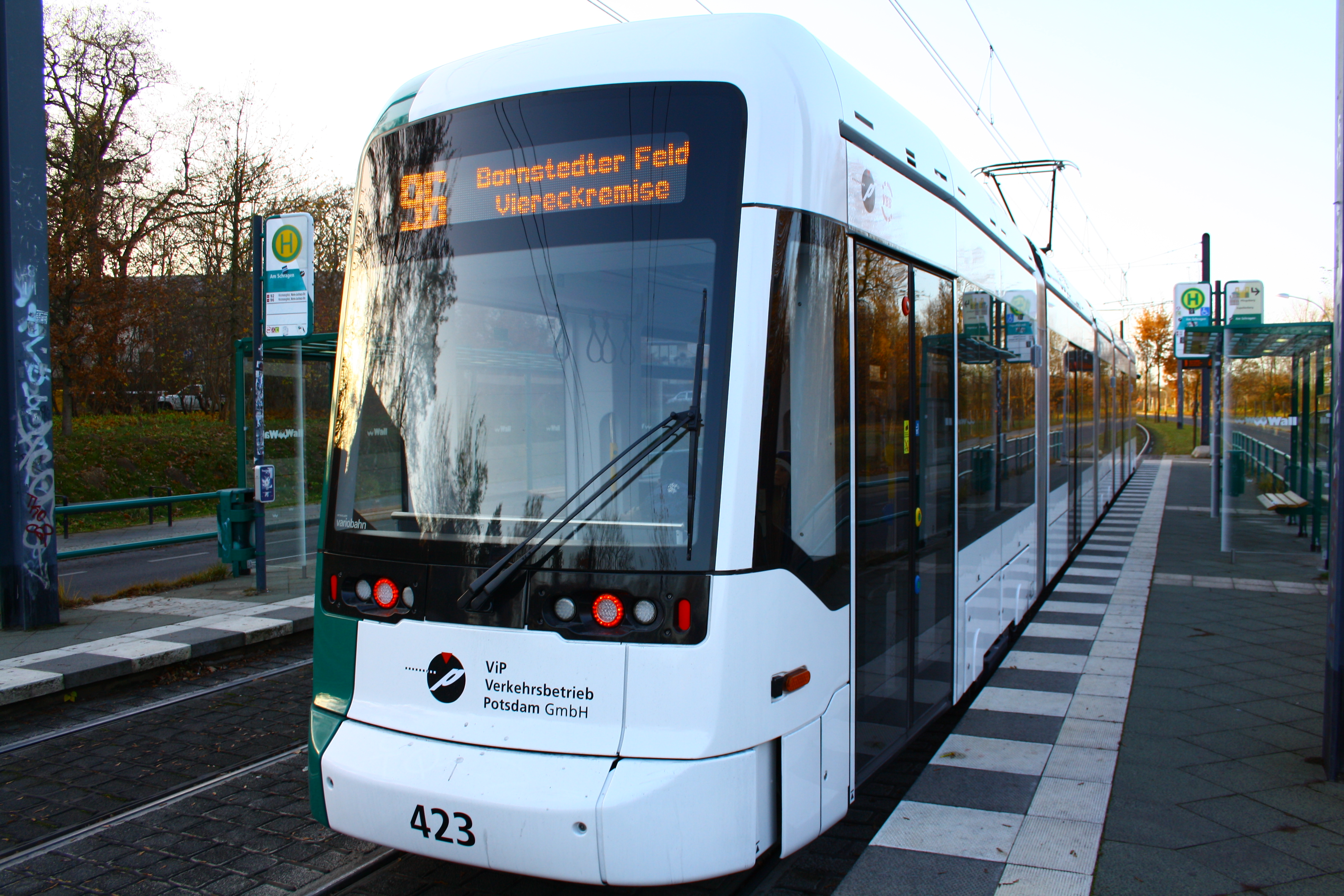 Variobahn in Potsdam